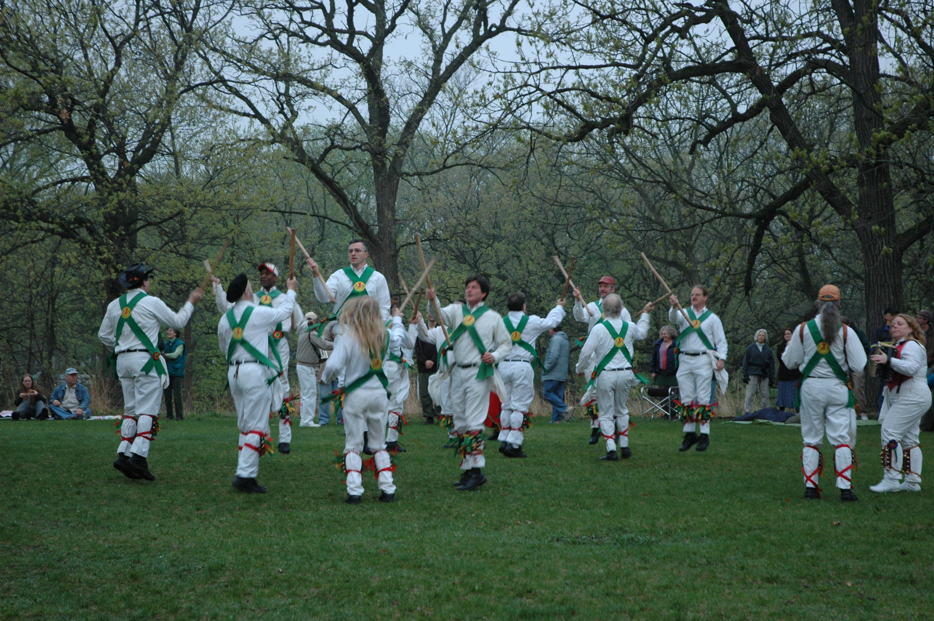 Morris dancingDSC_7249.jpg